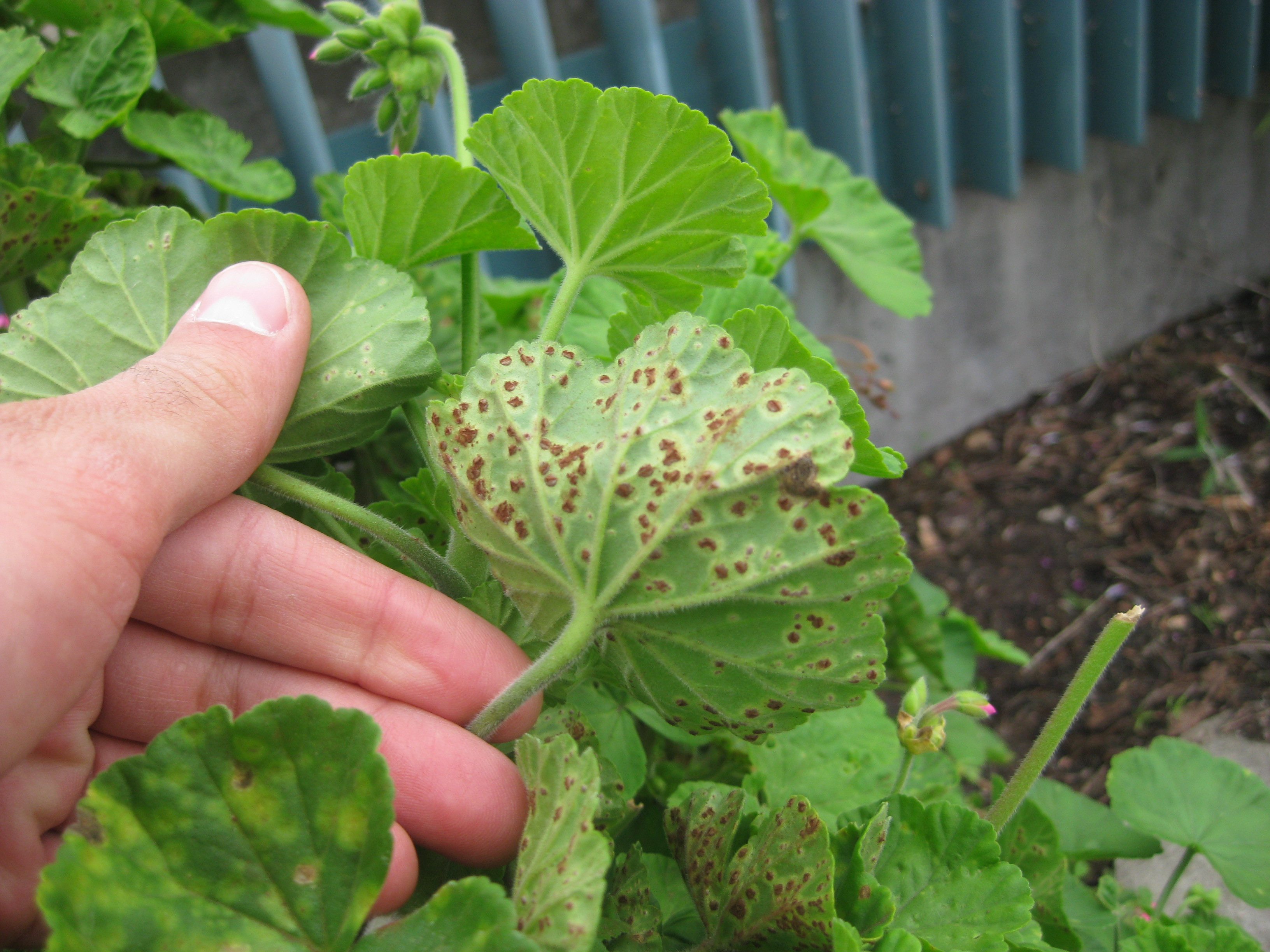 Puccinia malvacearum (Bertero ex Montagne 1852)